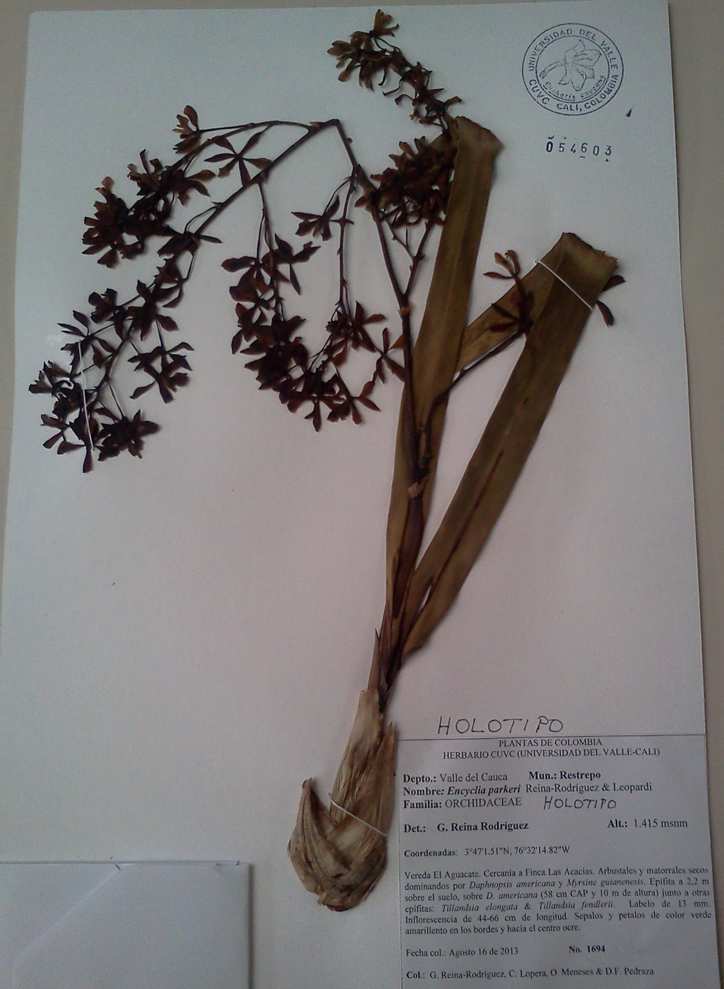 Ejemplar conservado de E. parkeri encontrado en el Herbario Luis Sigifredo Espinal Tascón de la Universidad del Valle